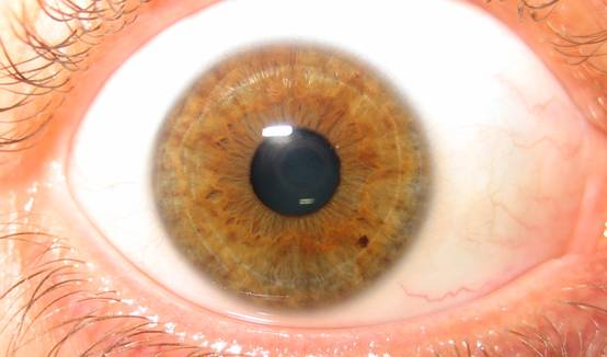 עין בצבע ענבר.